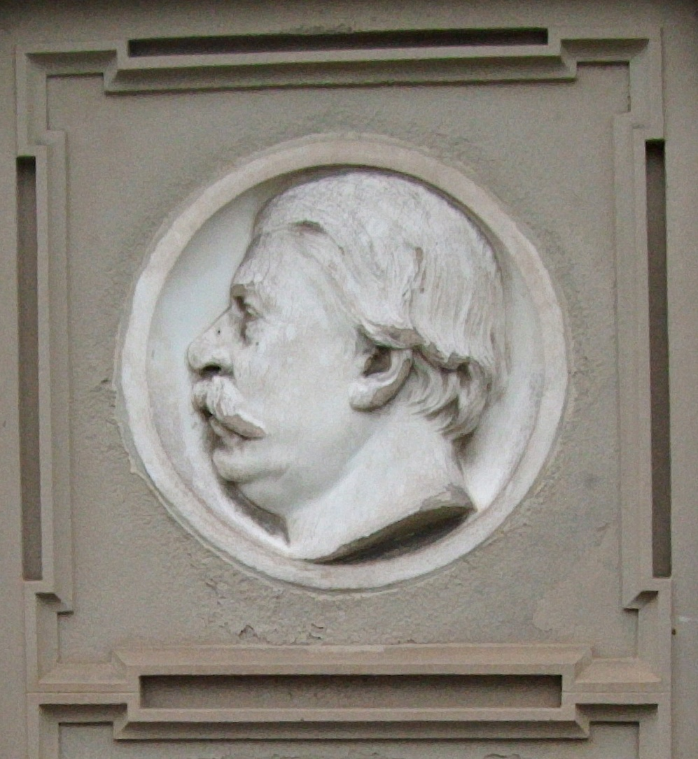 Ludwig Andreas Jordan (1811-1883), Reichstags- und bayerischer Landtagsabgeordneter, Portraitbüste vom Grab auf dem Friedhof Deidesheim.